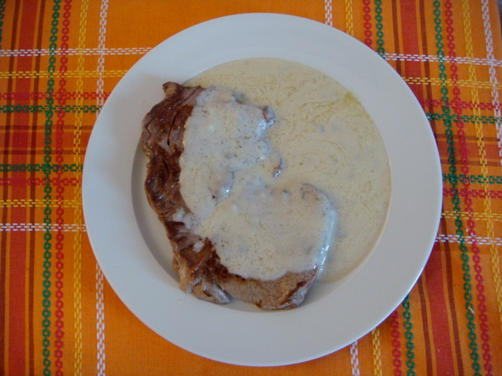 Entrecote amb salsa roquefort.